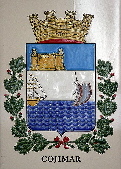 Blason de Cojímar, La Havane, Cuba